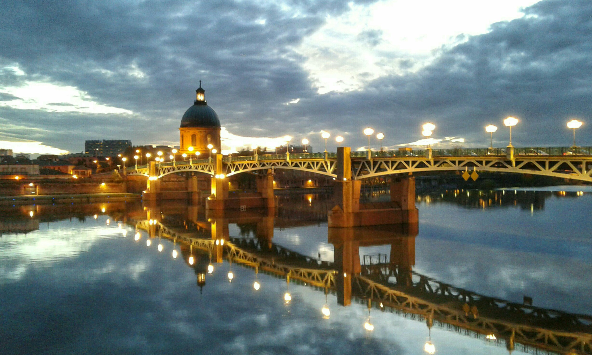 Pont Saint Pierre